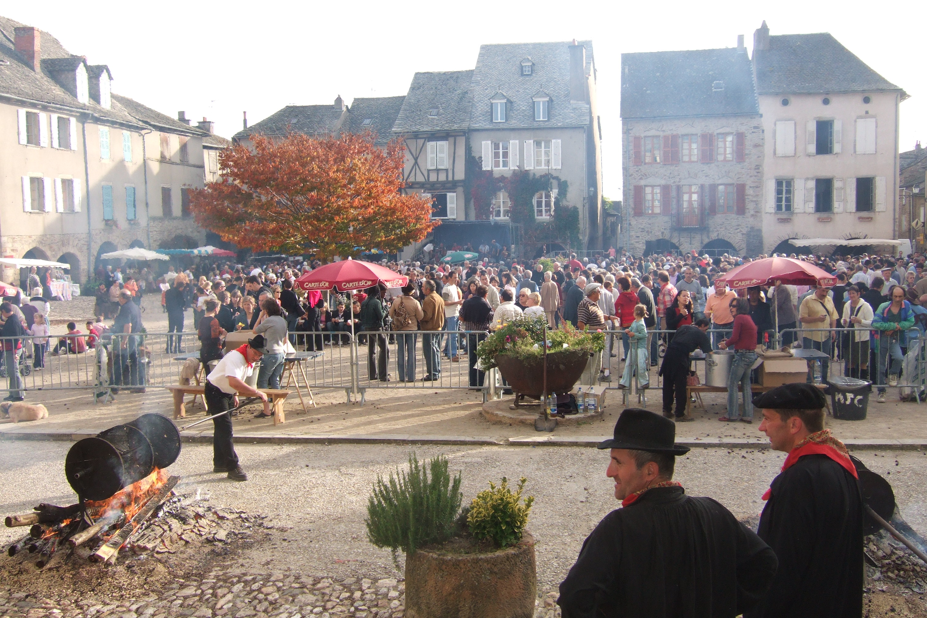 en octobre fête de la Chataigne